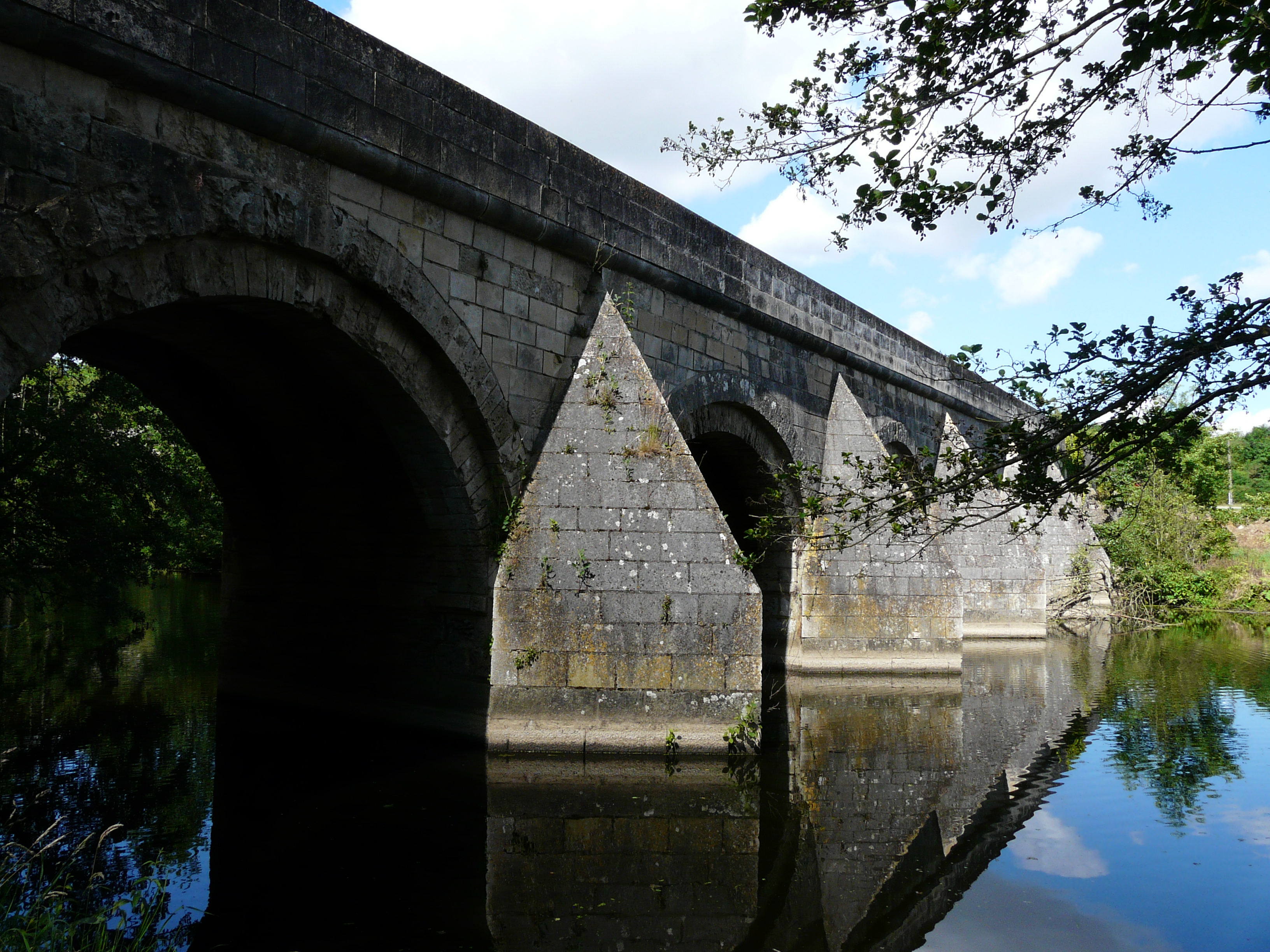 Le pont de Vernay (côté amont) sur le Thouet, Airvault, Deux-Sèvres, France